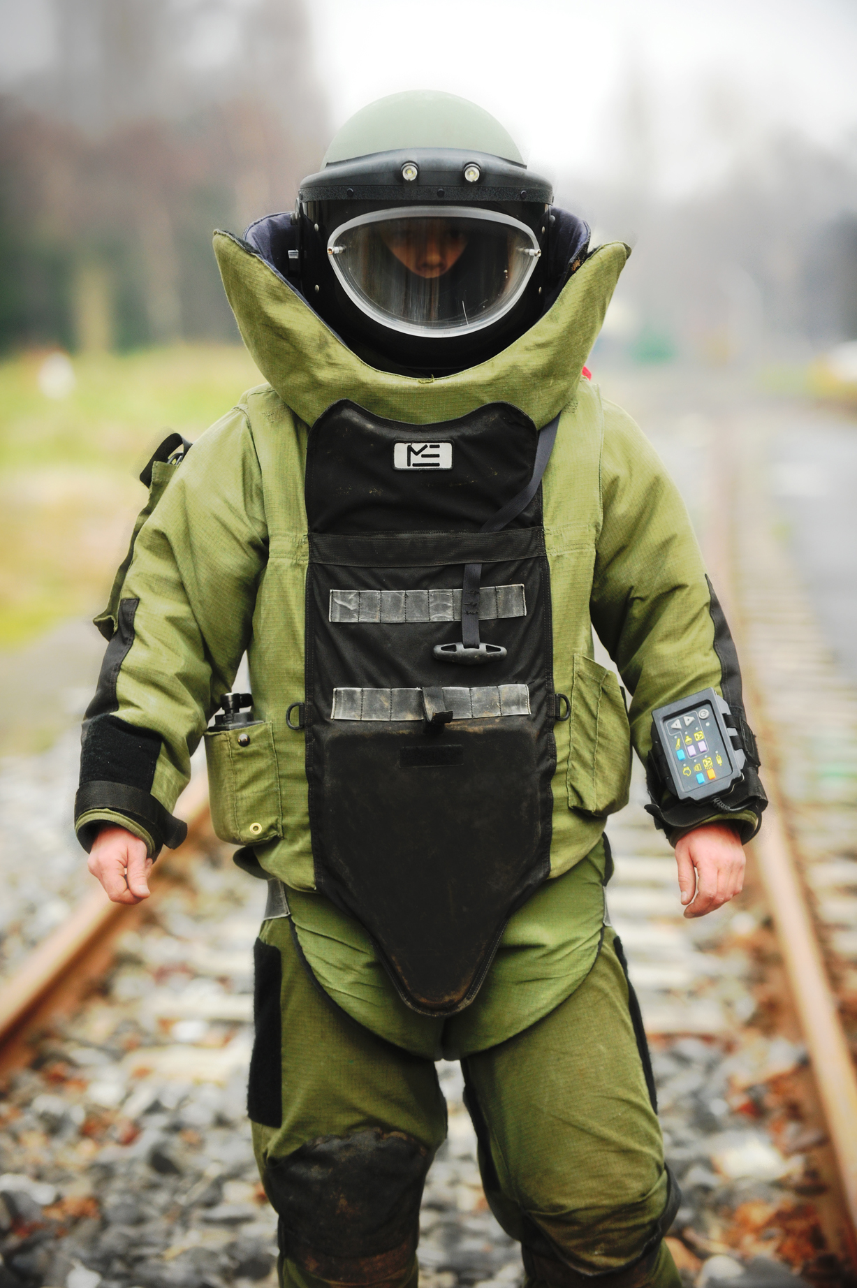 EOD/Bomb Disposal Operator